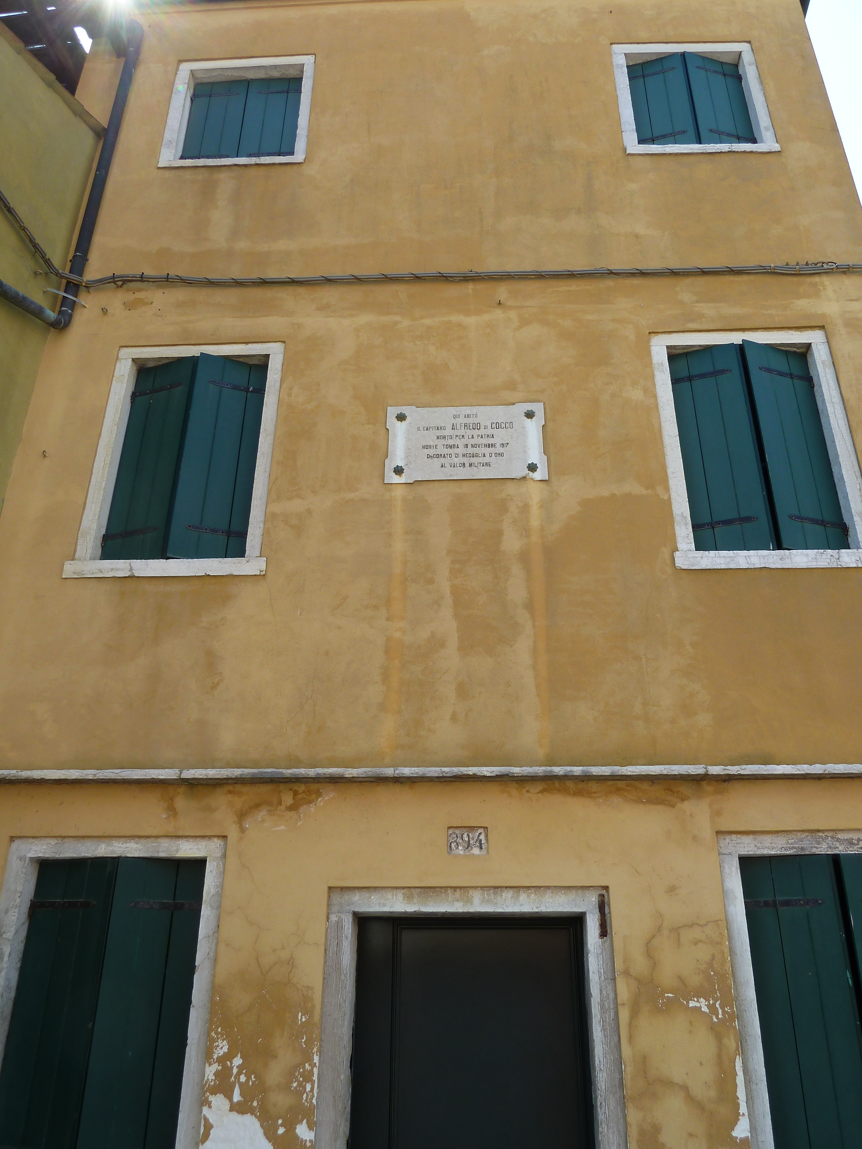 Casa Alfredo di Cocco — Burano.